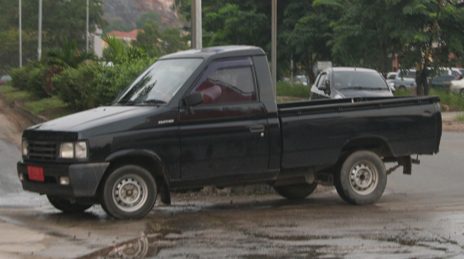 Isuzu Panther Pickup